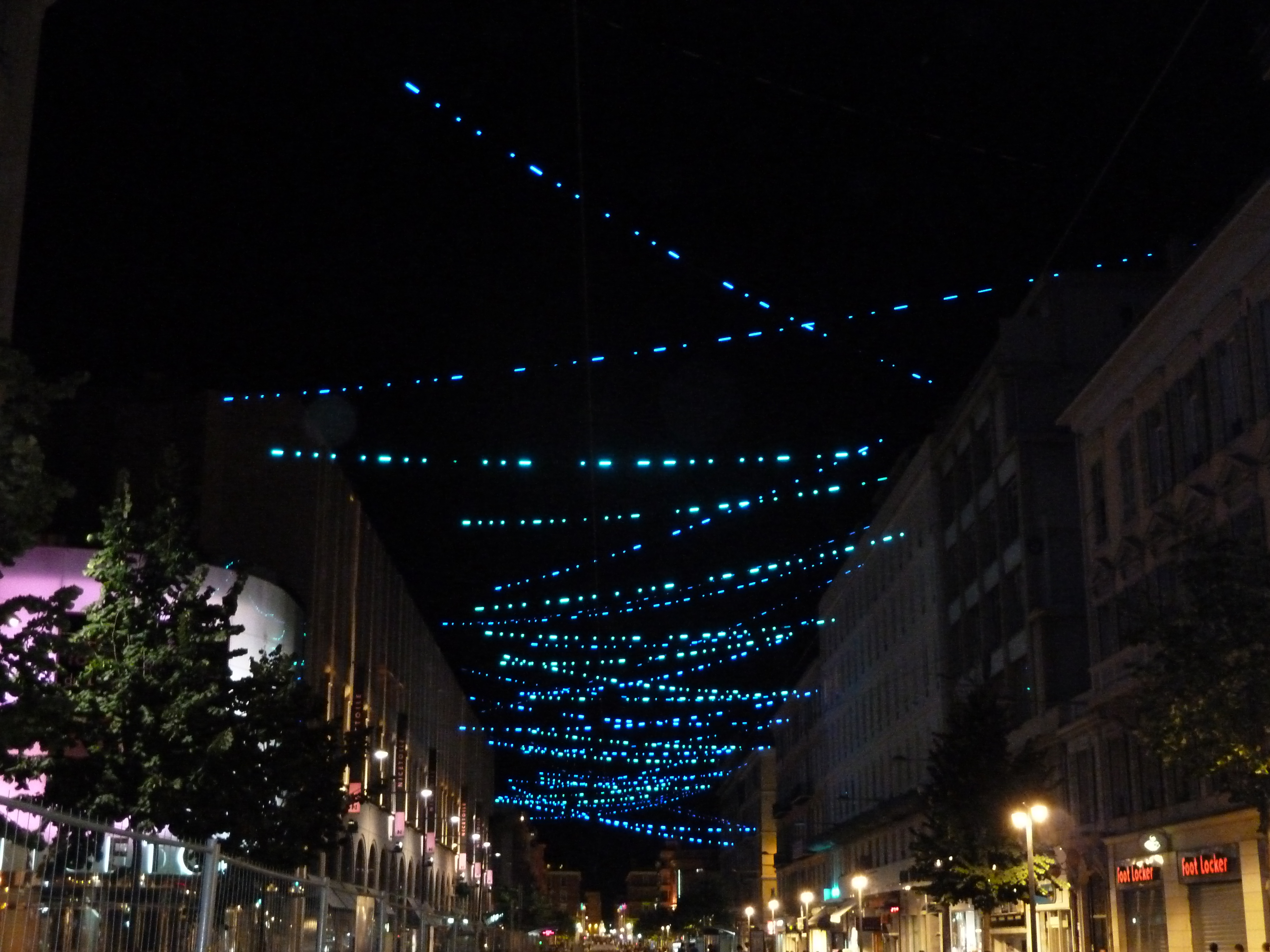 Œuvre "L’amorse du bleu" de Yann Kersalé sur l’avenue Jean Médecin, Nice